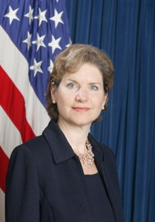 Susan Schwab, U.S. Trade Representative.